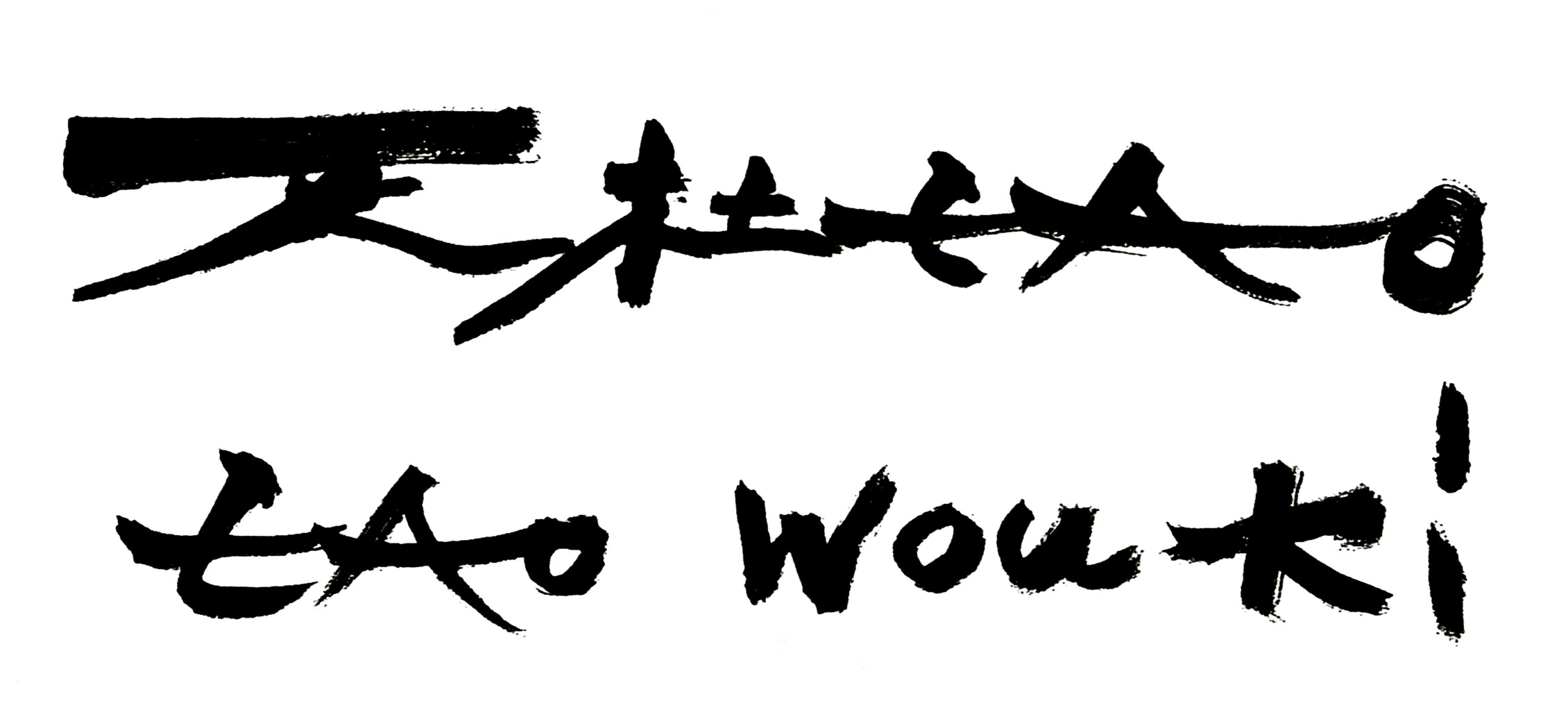 Signatures du peintre Zao Wou-Ki, scan d'après catalogue. This signature is believed to be ineligible for copyright and therefore in the public domain because it falls below the required level of originality for copyright protection both in the United States and in the source country (if different). In this case, the source country (e.g. the country of nationality of the signatory) is believed to be France. Cette image ou le texte qui y est représenté est seulement composé de formes géométriques simples et de texte. Elle n’atteint pas le seuil d'originalité nécessaire pour la protection du droit d’auteur, et est donc du domaine public. See autographs of Magritte and Picasso